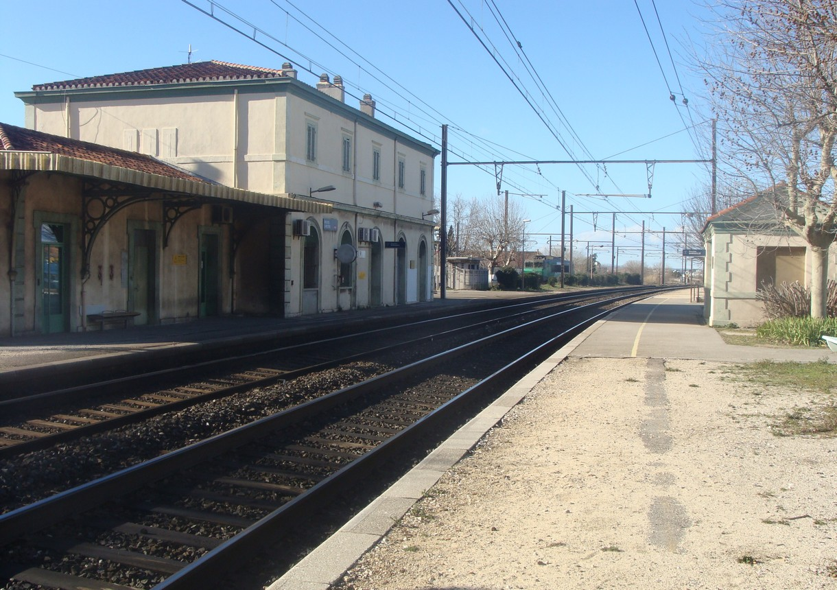 Gare de Pas-des-Lanciers : les quais et voies de la ligne principale. Vue prise en direction du nord.